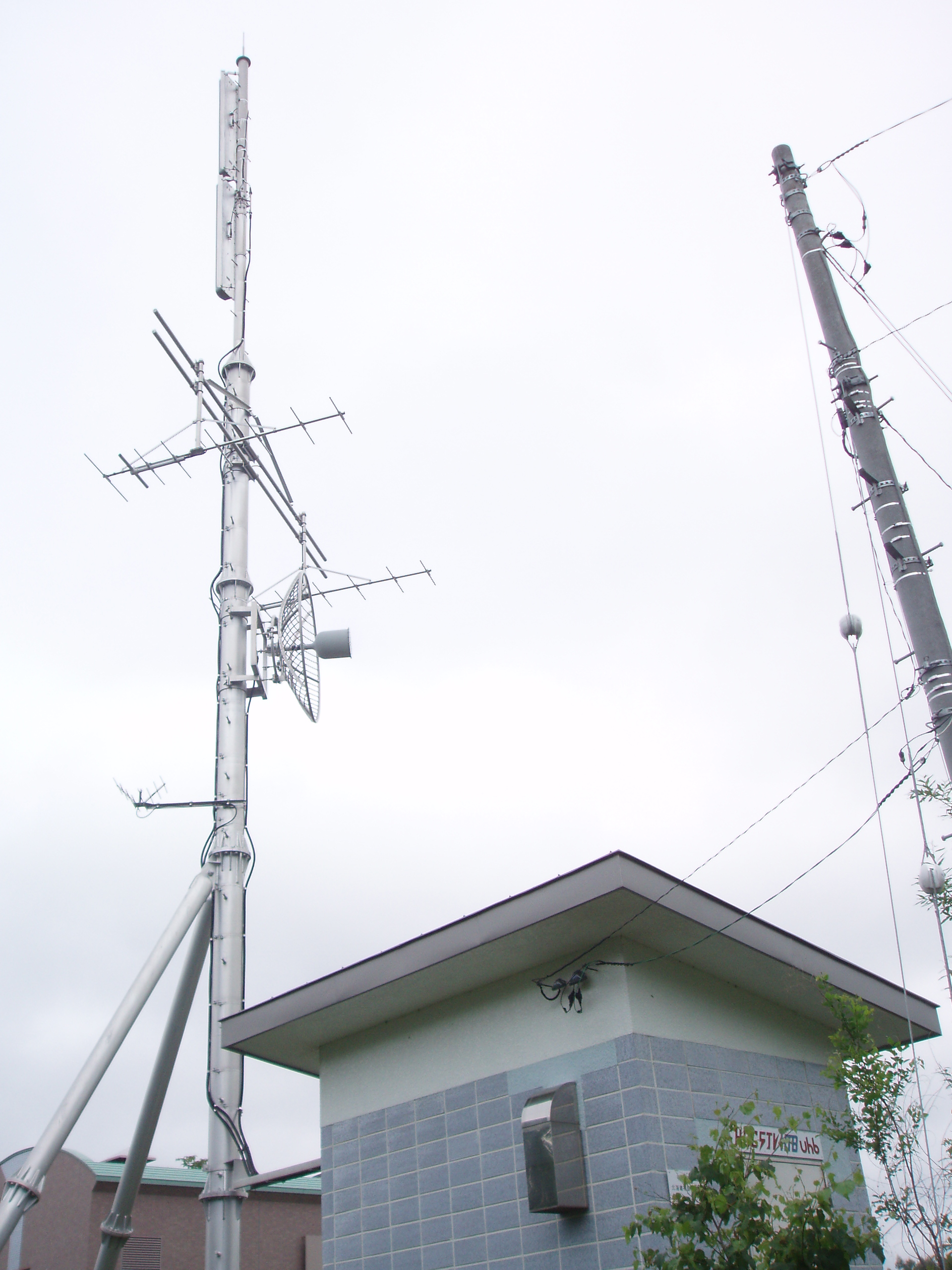 訓子府中継局 HBC・STV・HTB・UHB送信設備